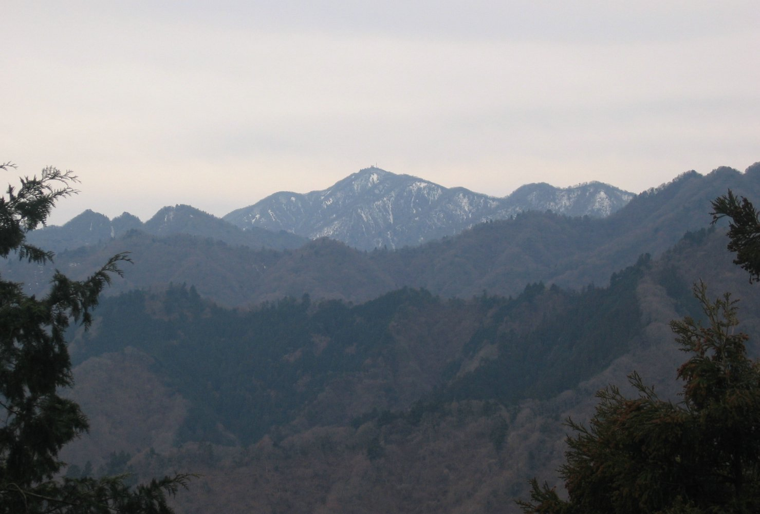 仏果山中腹から望む大山